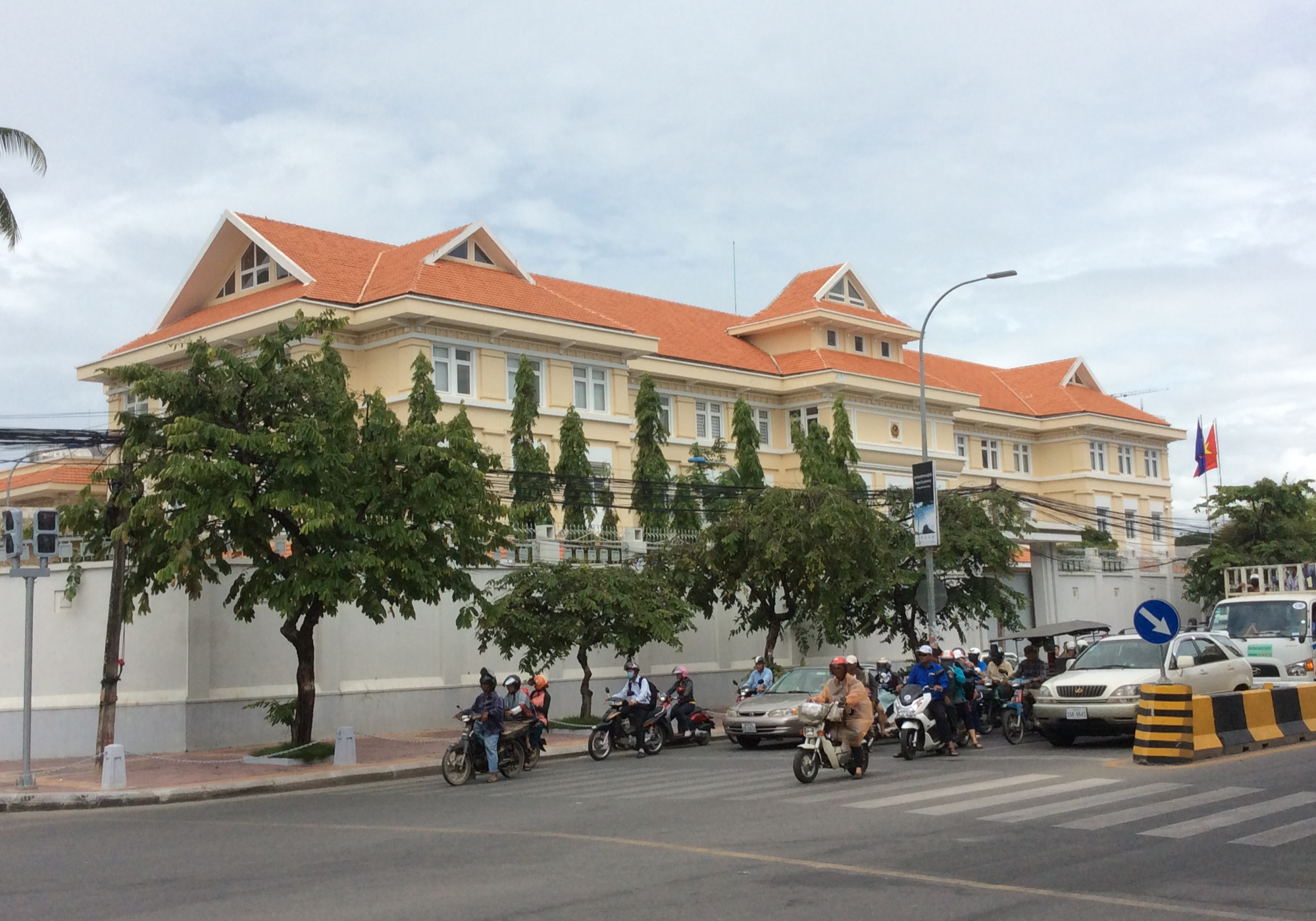 Chụp ảnh tại Phnôm Penh 2017.06.06 14g04 phút, iPad 2, Ảnh phạm vị công cộng (CC0)